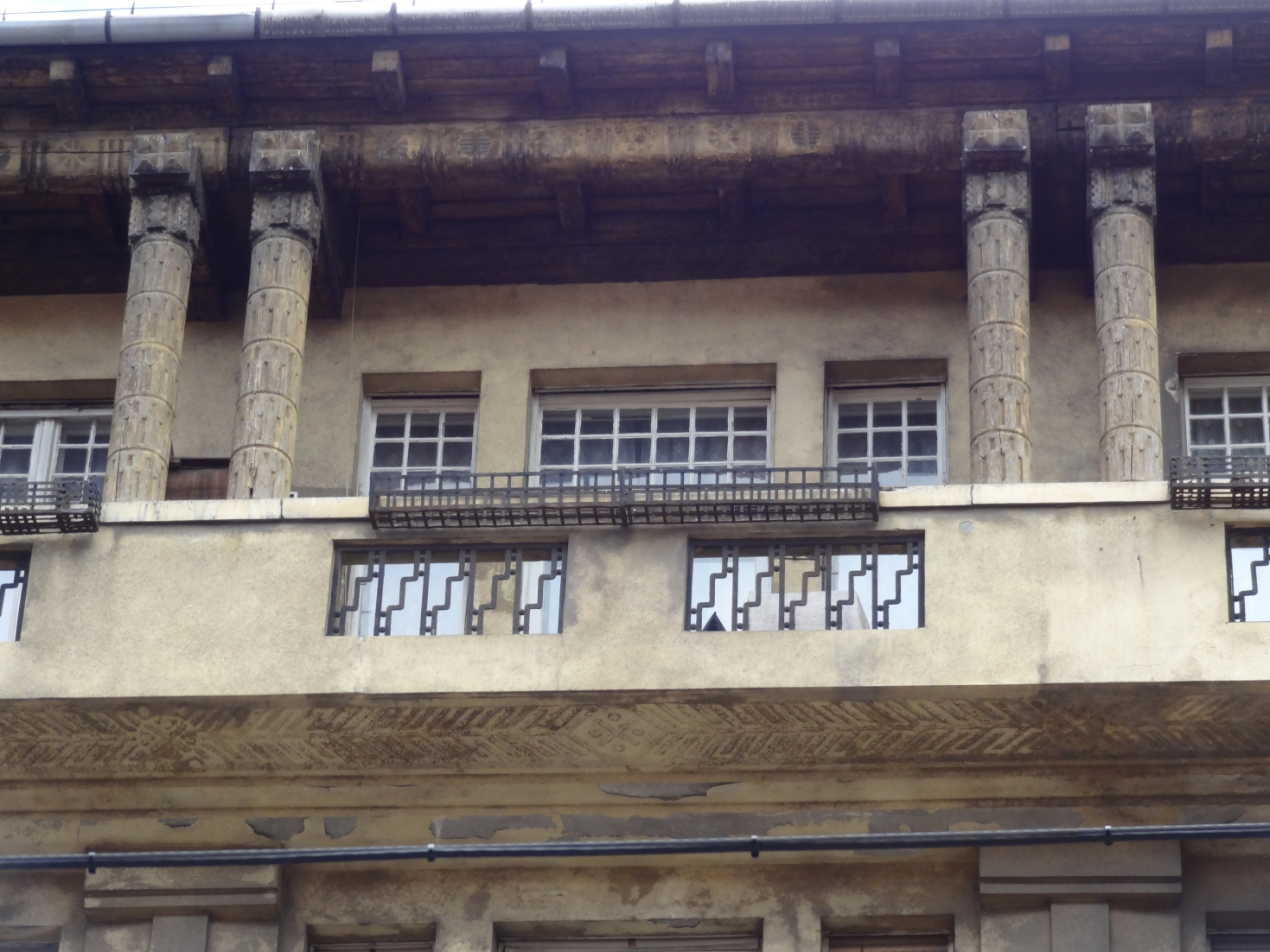 Budapest, Népszínház utca 37. – Erkély 2017